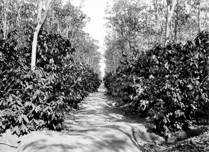 Negatief. Een 'schone' cacao-tuin met djati-runggo-hybride gewassen en dadapbomen voor de schaduw, Oost-Java